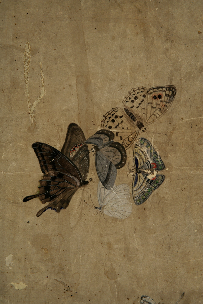 모란호접도 부분 확대, 종이에 채색, 미국 메트로폴리탄 미술관 소장